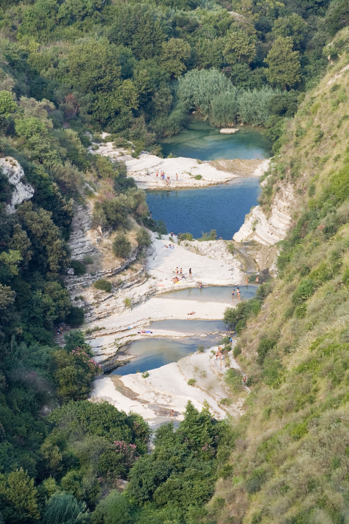 Cava grande del Cassibile, Sicily